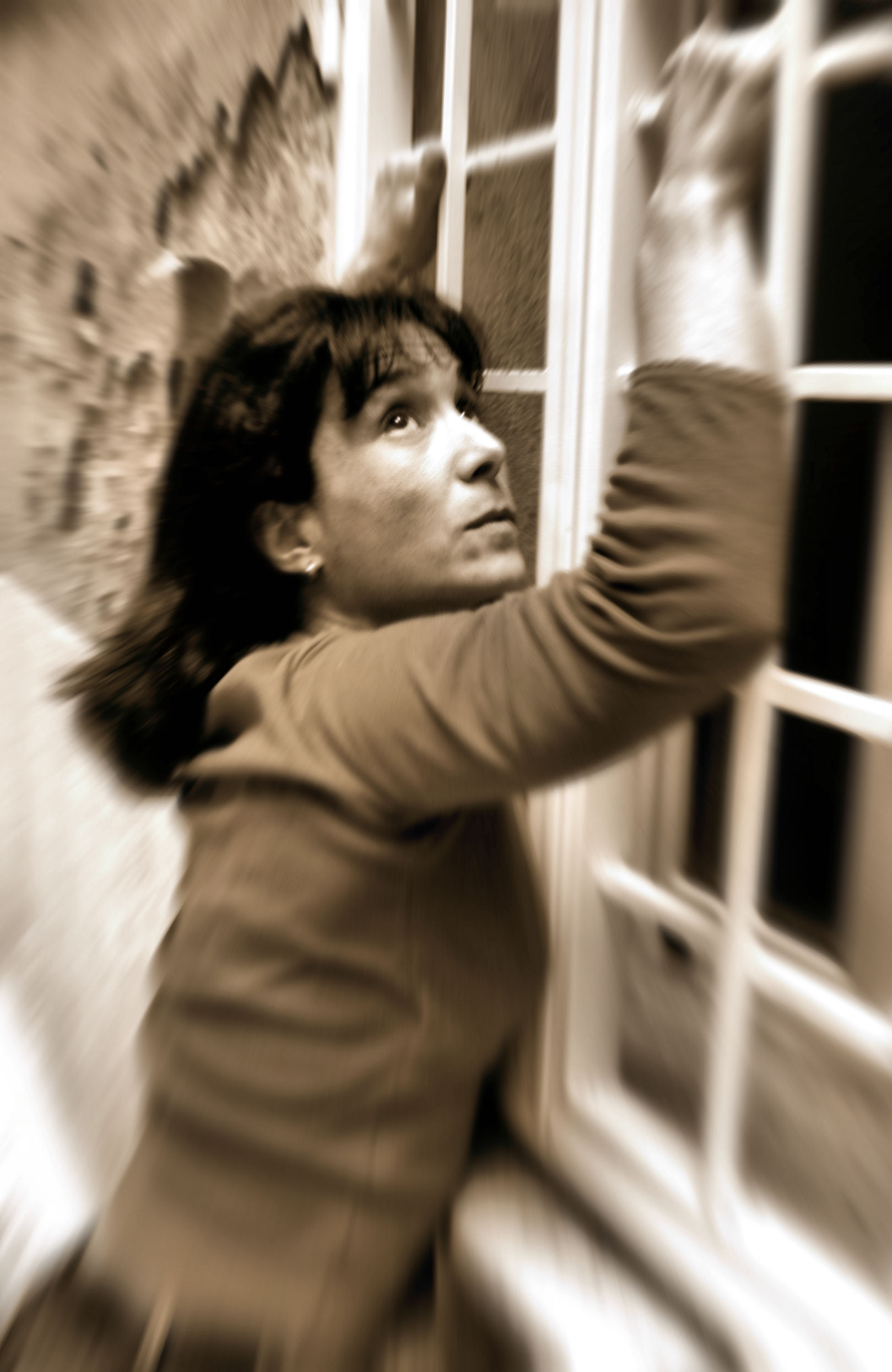 Natalie Guettà